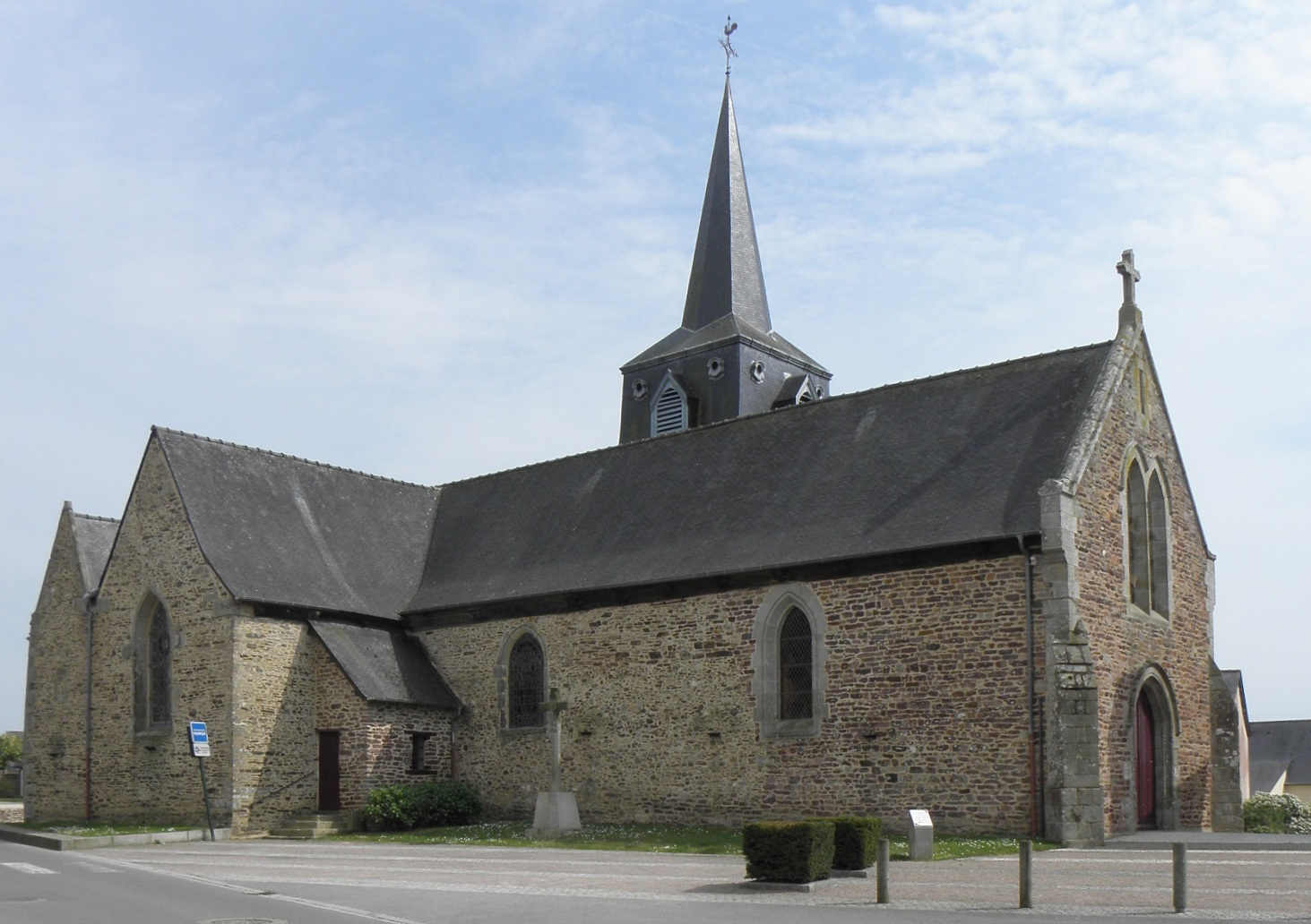 Église de Saint-Onen-la-Chapelle. Extérieur. Vue septentrionale.